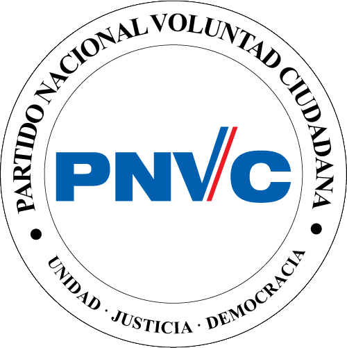 Logo del Partido Nacional Voluntad Ciudadana